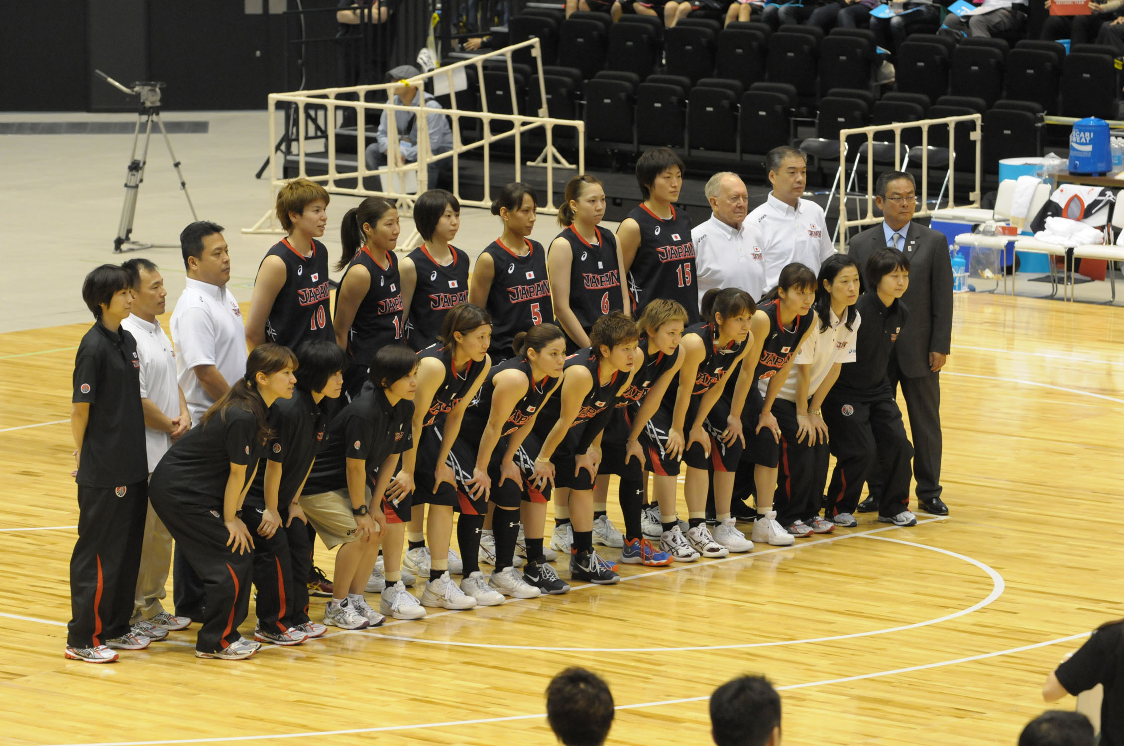 バスケットボール女子日本代表、ゼビオアリーナ仙台で。